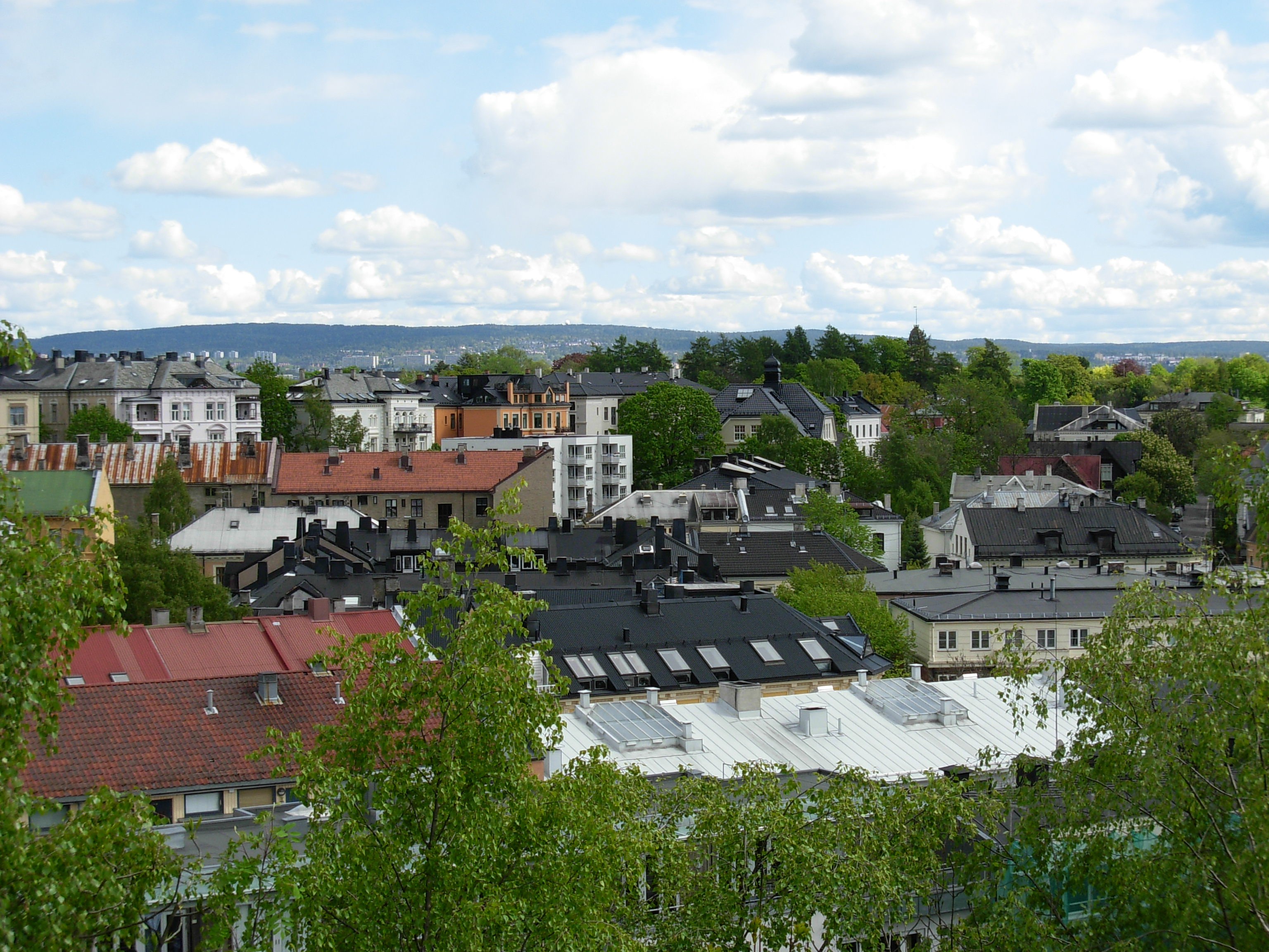 Bolteløkka, Oslo, seen from Blåsen, Stensparken